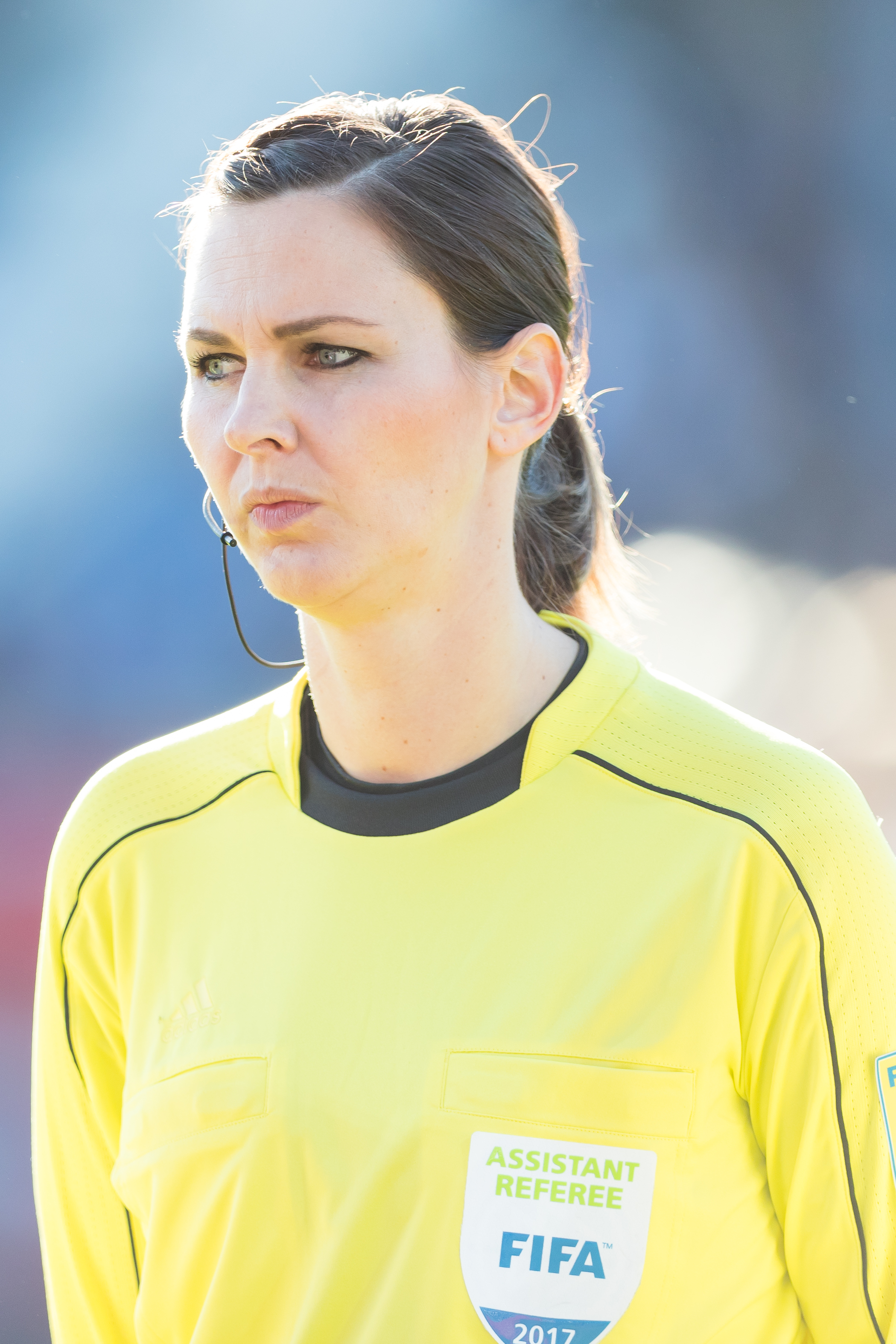 during Fussball Frauen Deutschland vs Island at Brita-Arena, Wiesbaden, Hessen, Germany on 2017-10-20, Photo: Sven Mandel